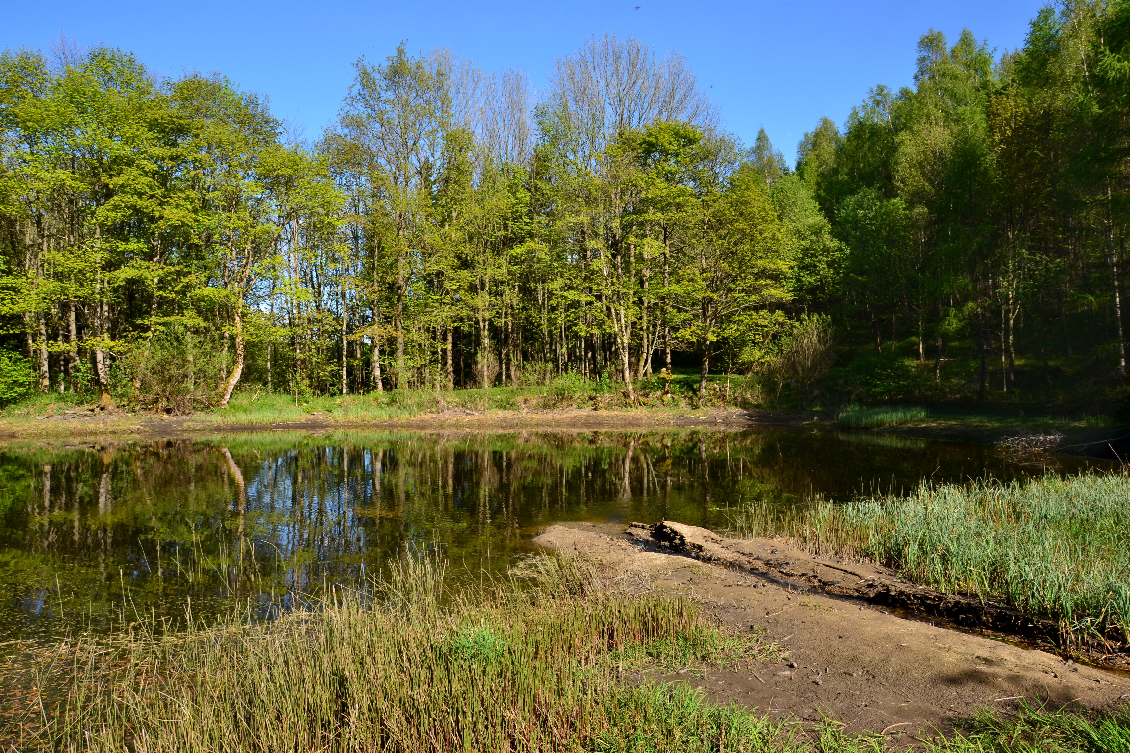 Rybník na okraji zaniklých Menhartic